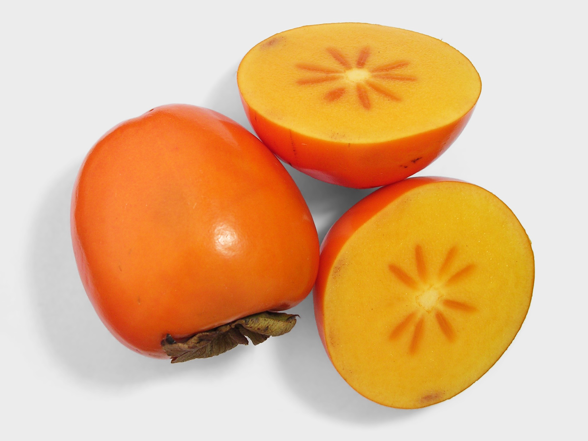 Persimmon